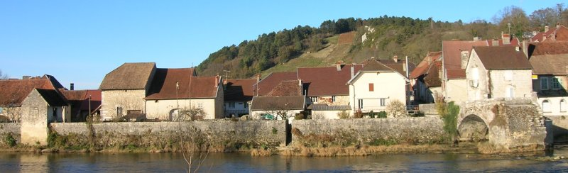 Photographie du port ; village de Port Lesney, Jura, France